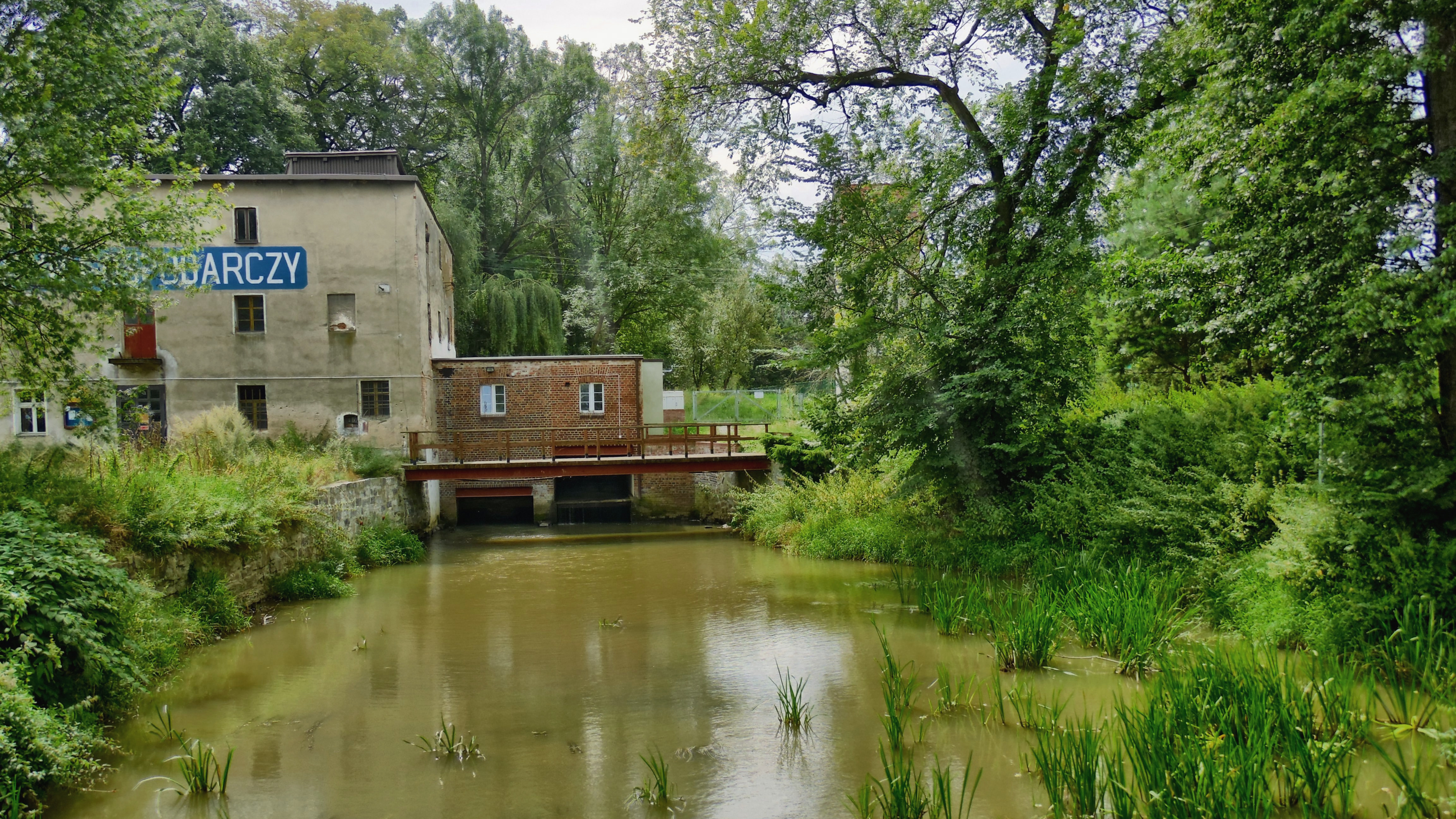 Wiązów, Poland